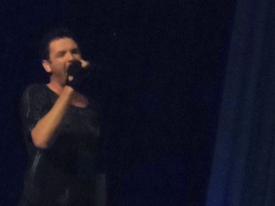 Мелитополь